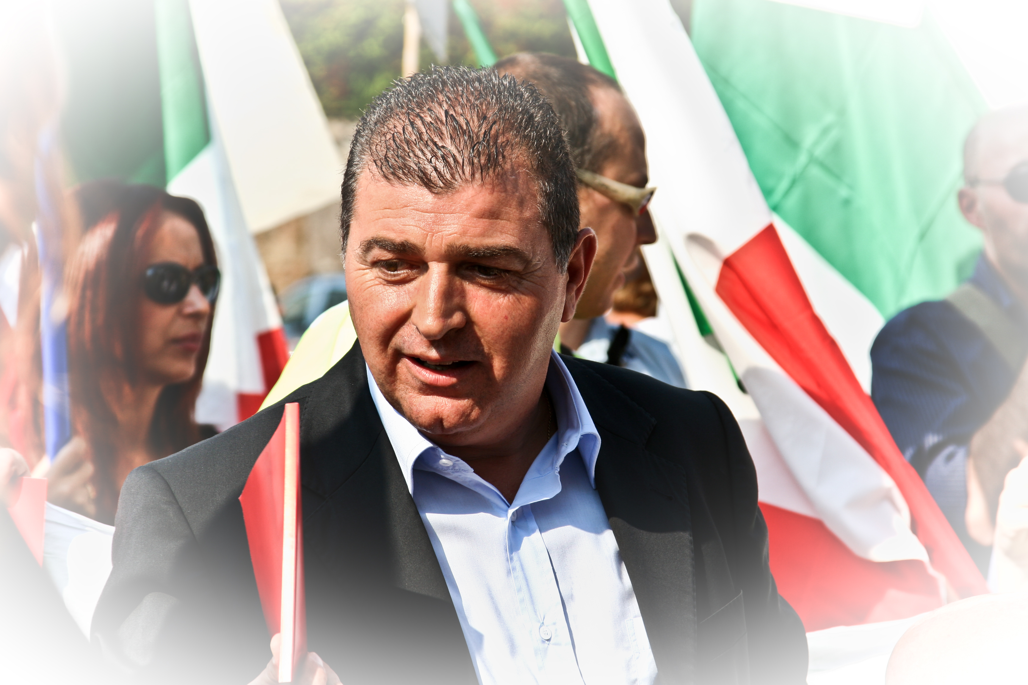 Giuseppe (Pino) Masciari - Roma - Sabato 26 Settembre 2009 - Manifestazione delle Agende Rosse